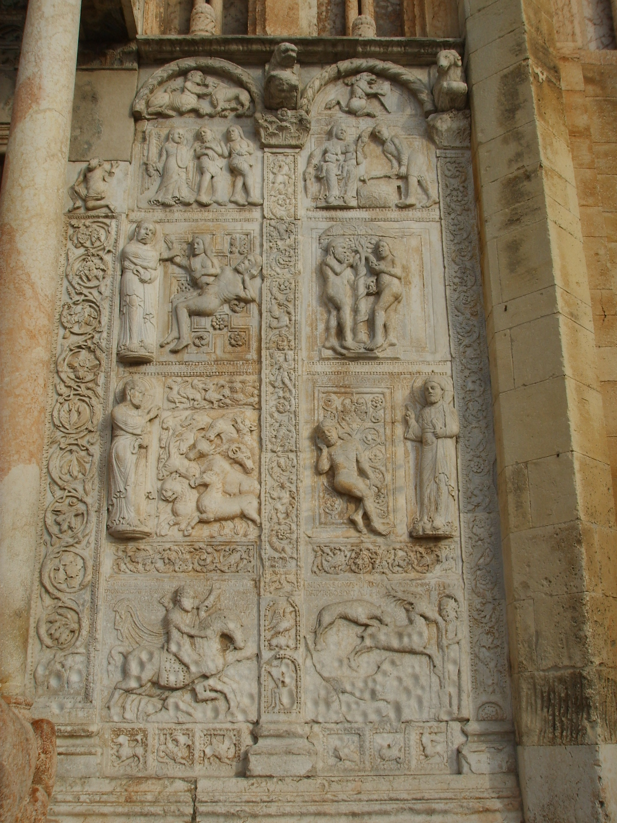 Basilica di san zeno protiro, pannelli dx della scuola di niccolò